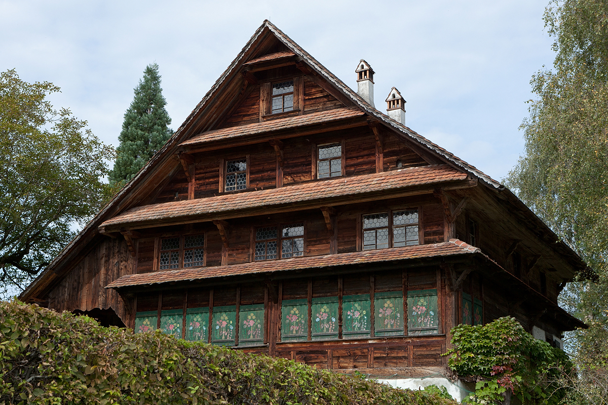 Wohnhaus (Gemeinde Geltwil) (AG)